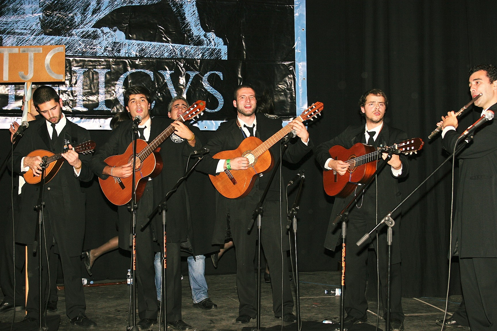 Scientiphicvs 2010 no Teatro Sá da Bandeira.